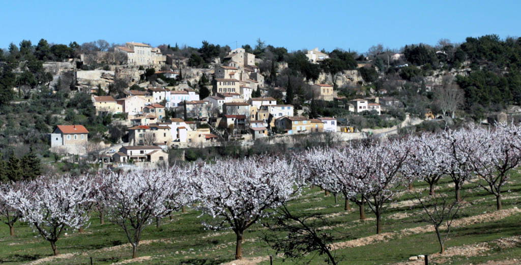 village of La Roque-sur-Pernes, Vaucluse, France